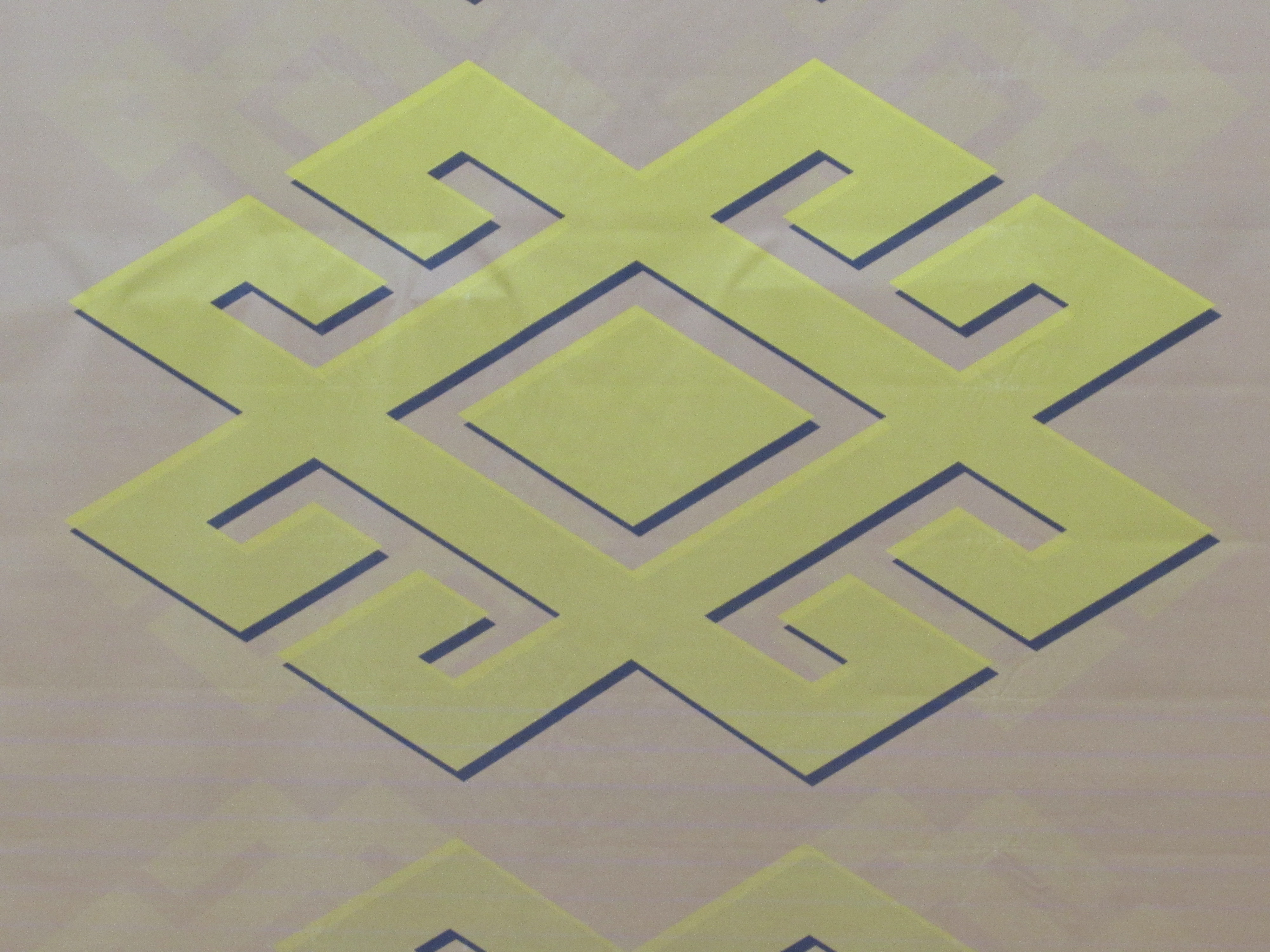 85-летие филиала